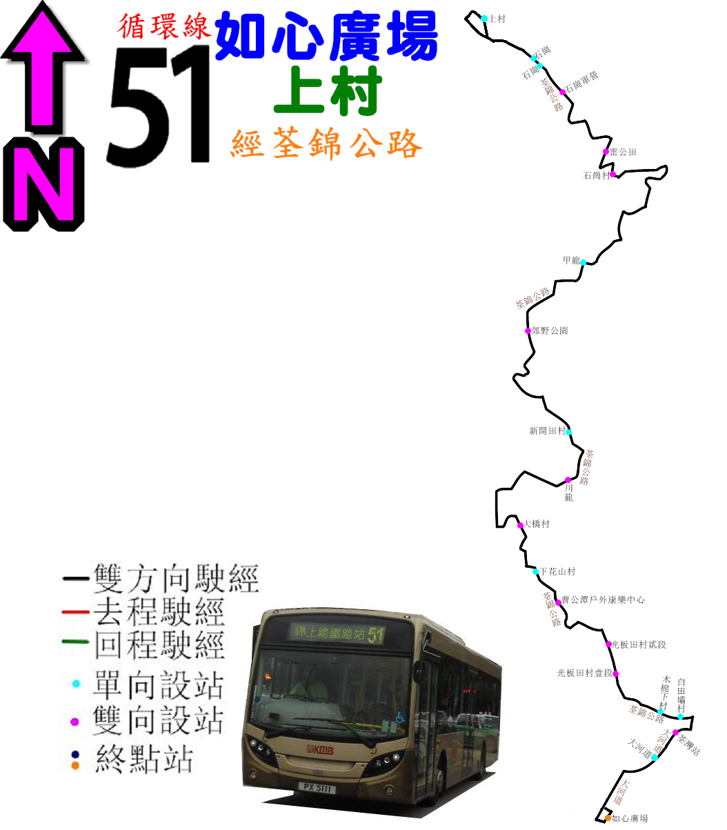 中文（香港）: 九巴51線的走線圖